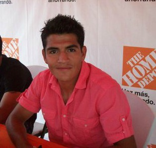 Jesus Enrique Sanchez Garcia